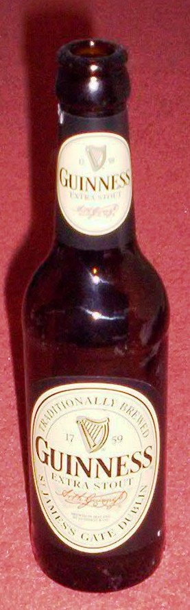 Beschreibung: Eine Flasche Guinness Quelle: Selbst fotografiert Fotograf oder Zeichner: User:Burntpunch Datum: Zülpich, 17. März 2006